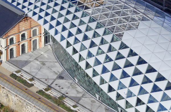 Bálna, légi fotó